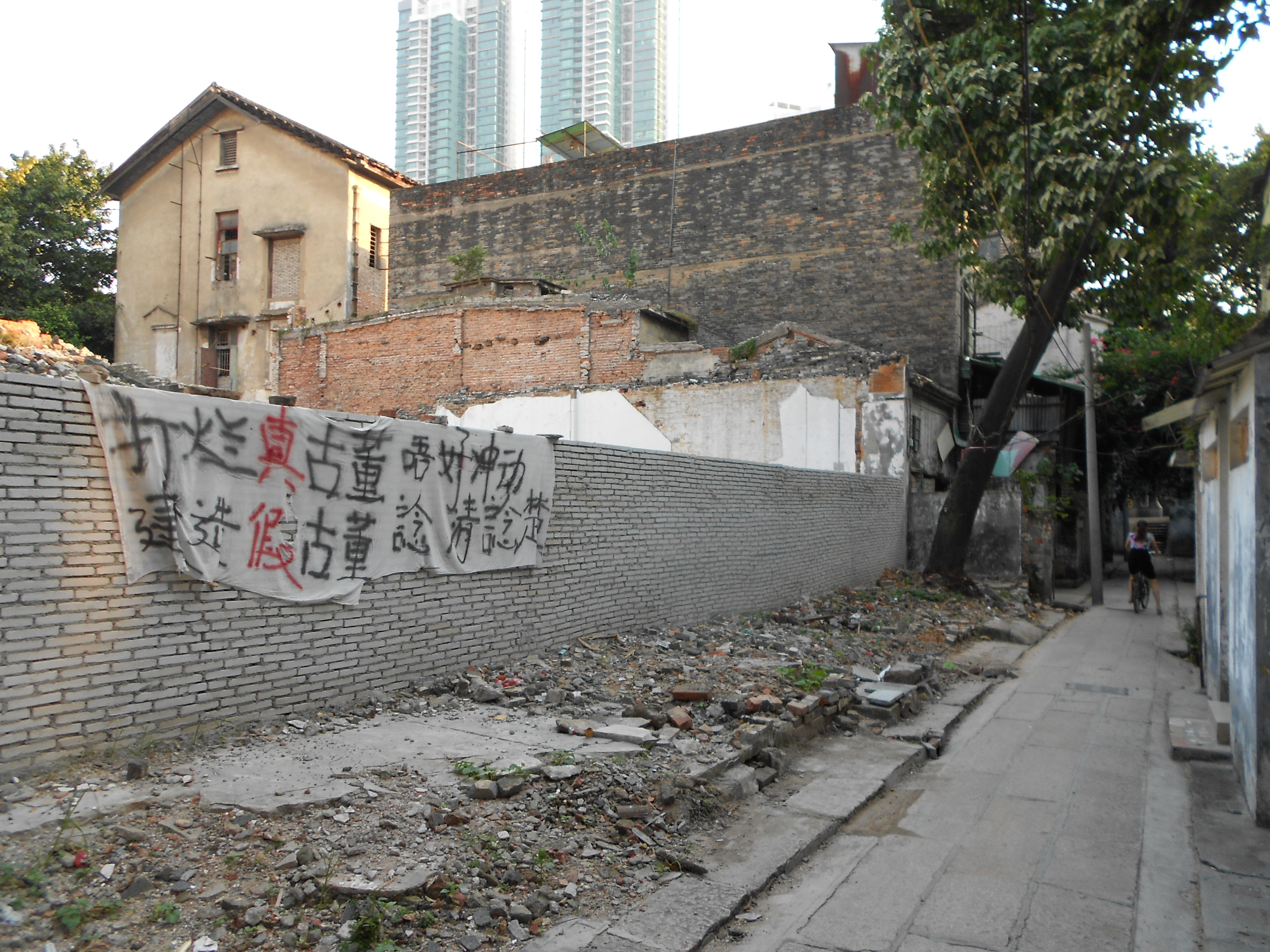 恩寧路舊城改造項目，這些標語是抗議當局未經諮詢隨意搬走內街麻石的行徑。內容是「打爛真古董，唔好衝動；建造假古董，諗清諗楚」。